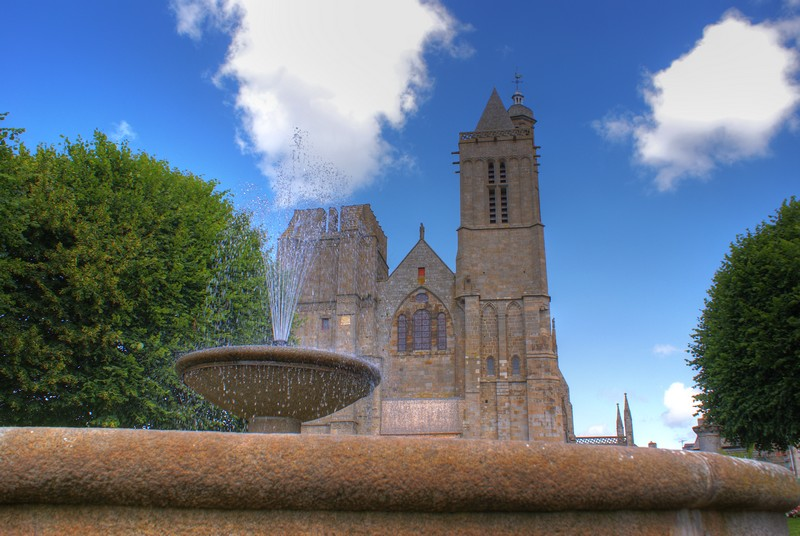 Cathédrale Saint Samson Dol de Bretagne (35), Bretagne, France